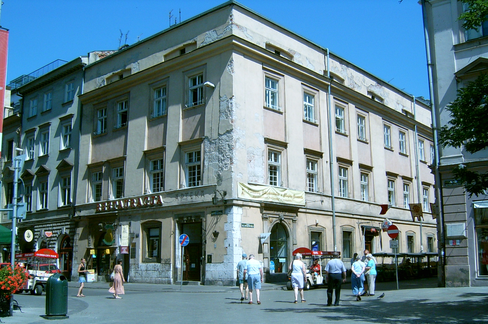 Kraków, Poland